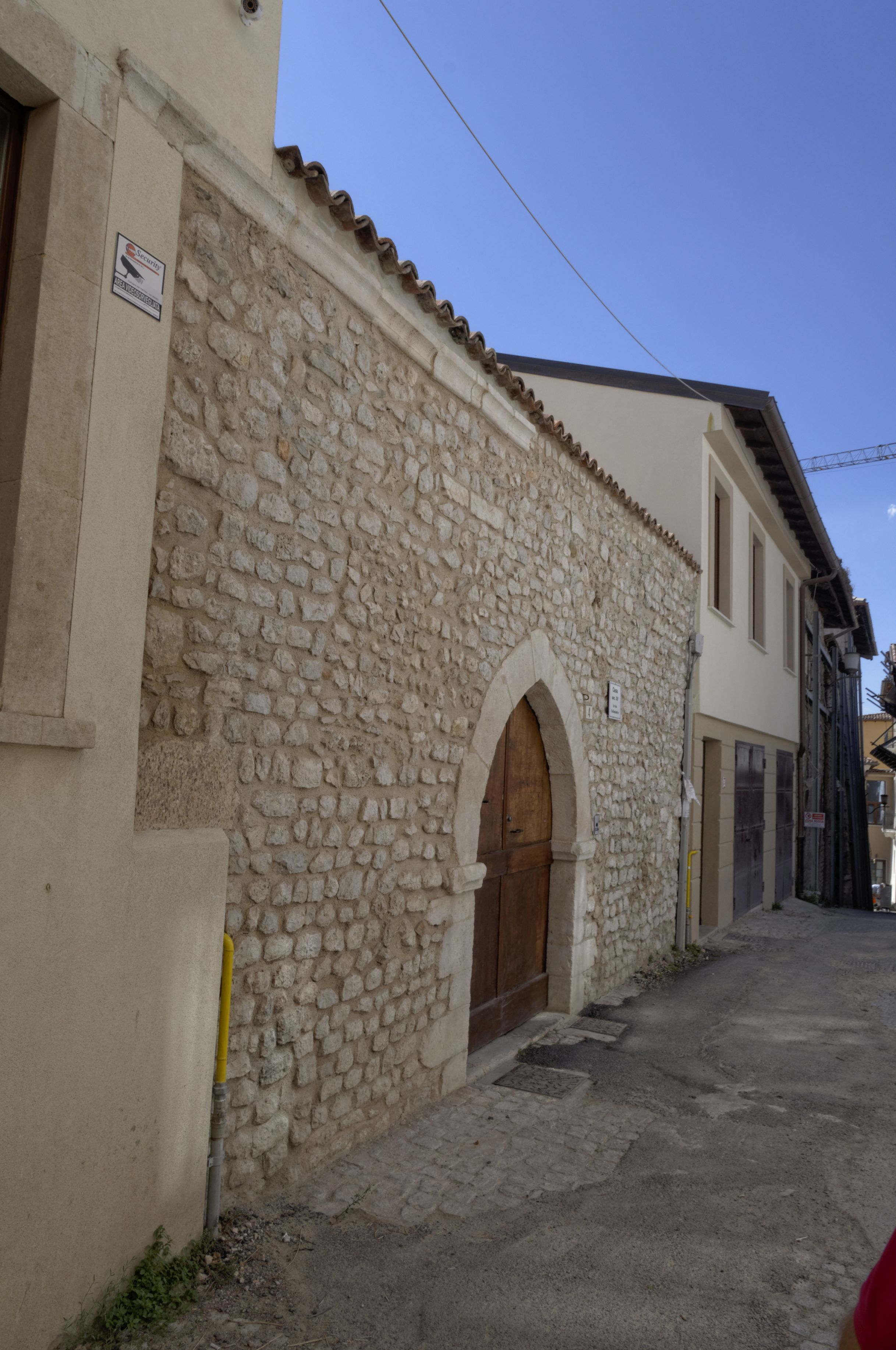 L'Aquila 2017 Dieses Foto entstand in Zusammenarbeit mit Stadtbesichtigungen.de Die Seiten Stadtbesichtigungen.de, der dazugehörige Reise Blog sowie die Facebookseite: Stadtbesichtigungen Rom dürfen dieses Bild für Ihre Veröffentlichungen ohne den Hinweis auf Wikipedia, Commons bzw der Lizenz verwenden. Die Verantwortlichen habe von mir (Ra Boe) die Originaldaten zur freien Verfügung übermittelt bekommen.